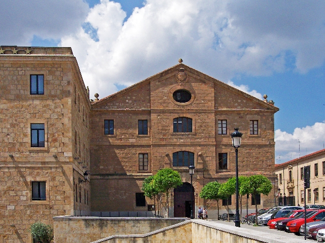 Fachada del Colegio